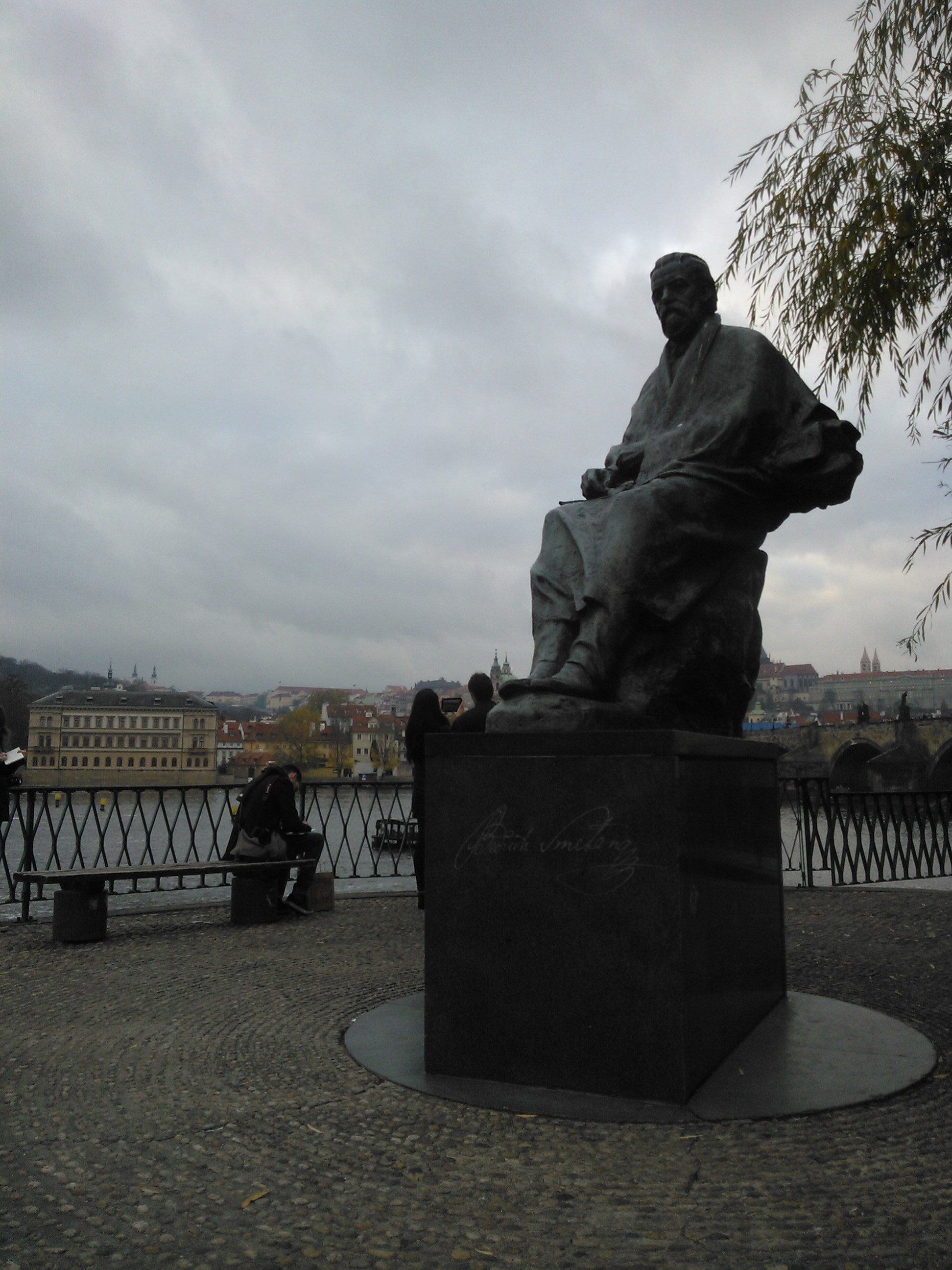 České muzeum hudby: Muzeum Bedřicha Smetany